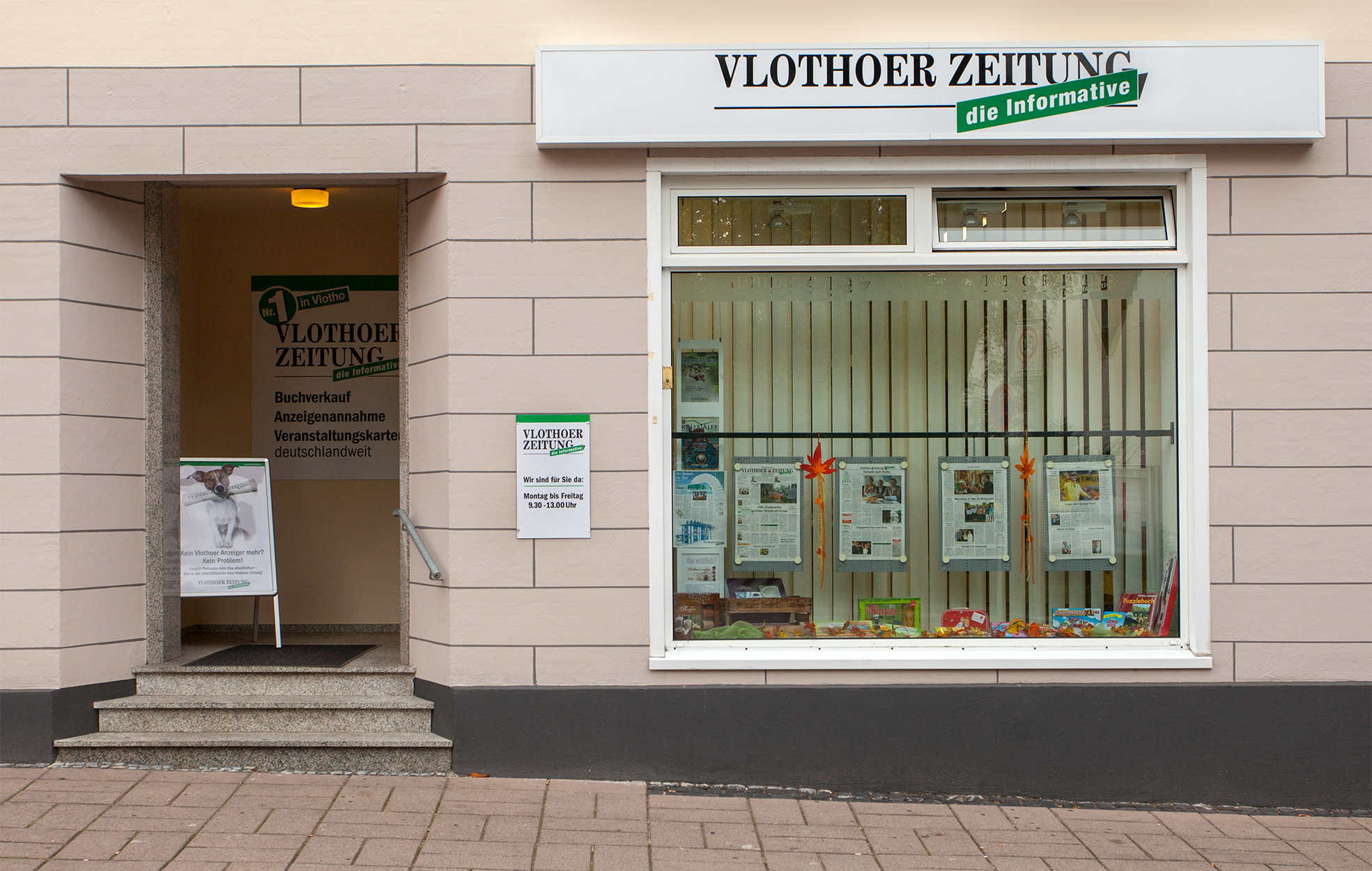 Vlothoer Zeitung in Vlotho